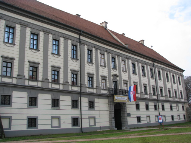 Dvorac Zrinskih - Muzej Međimurja Čakovec